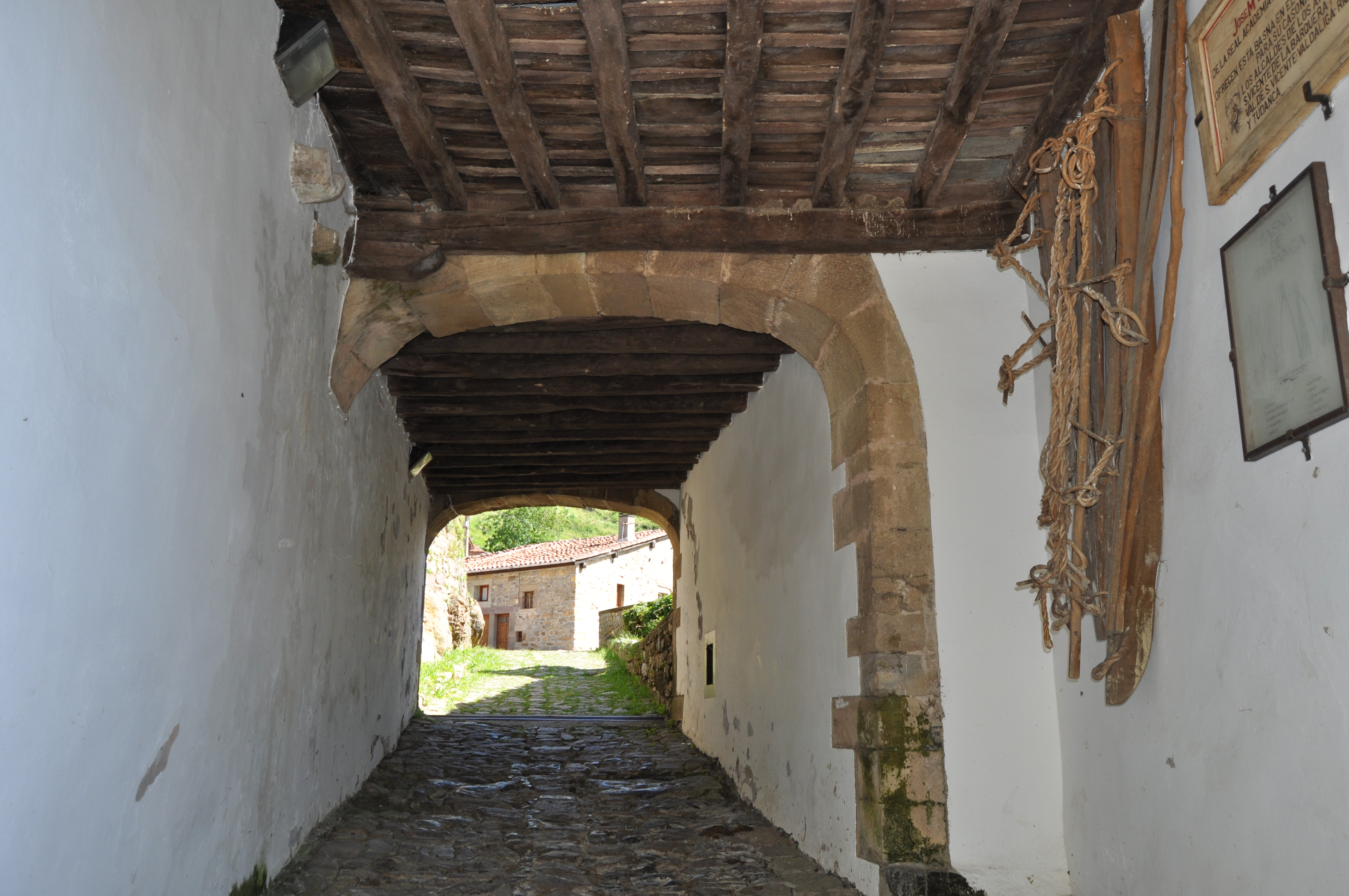 Tudanca - 014